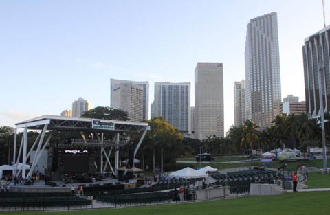 Stage y Miami